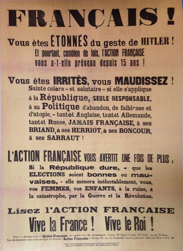 Affiche de l'Action française prévenant les français du danger d' Hitler et de la montée du nazisme en Europe et en Allemagne